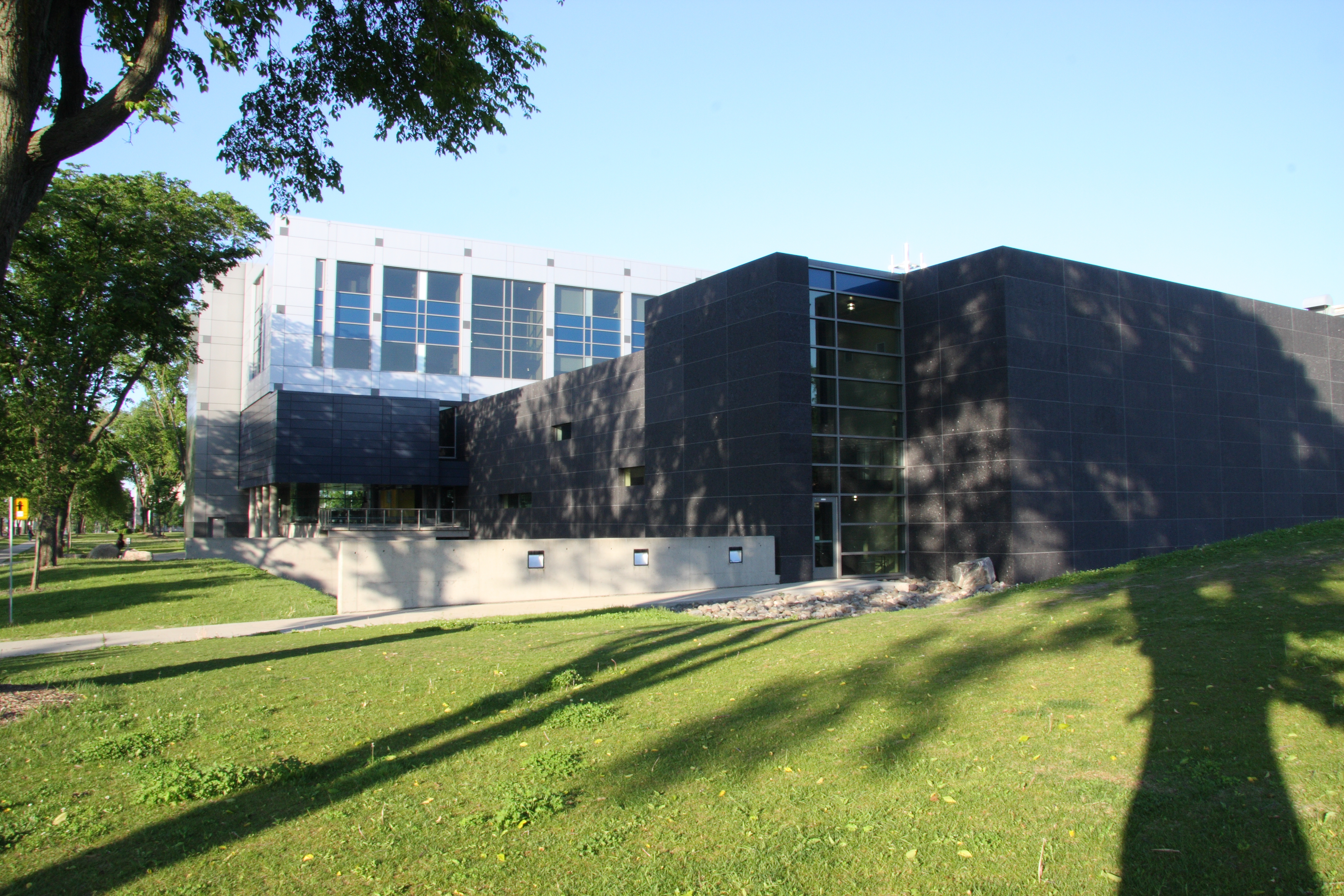 Pavillon d'Optique-photonique où se trouve le Centre d'optique, photonique et laser de l'Université Laval (COPL).